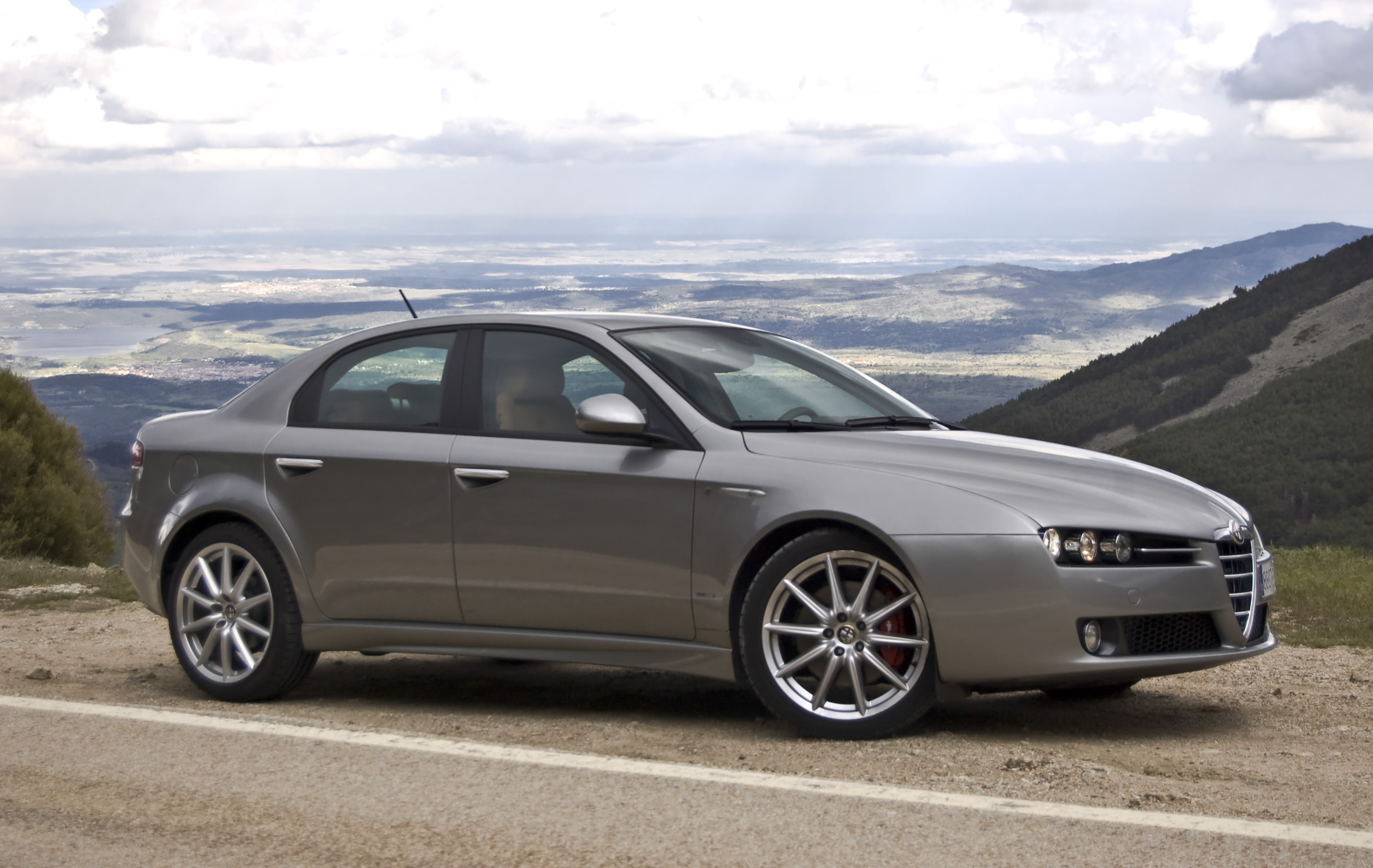 Alfa 159 2.0 JTDm ECO Elegante, prueba en Diariomotor